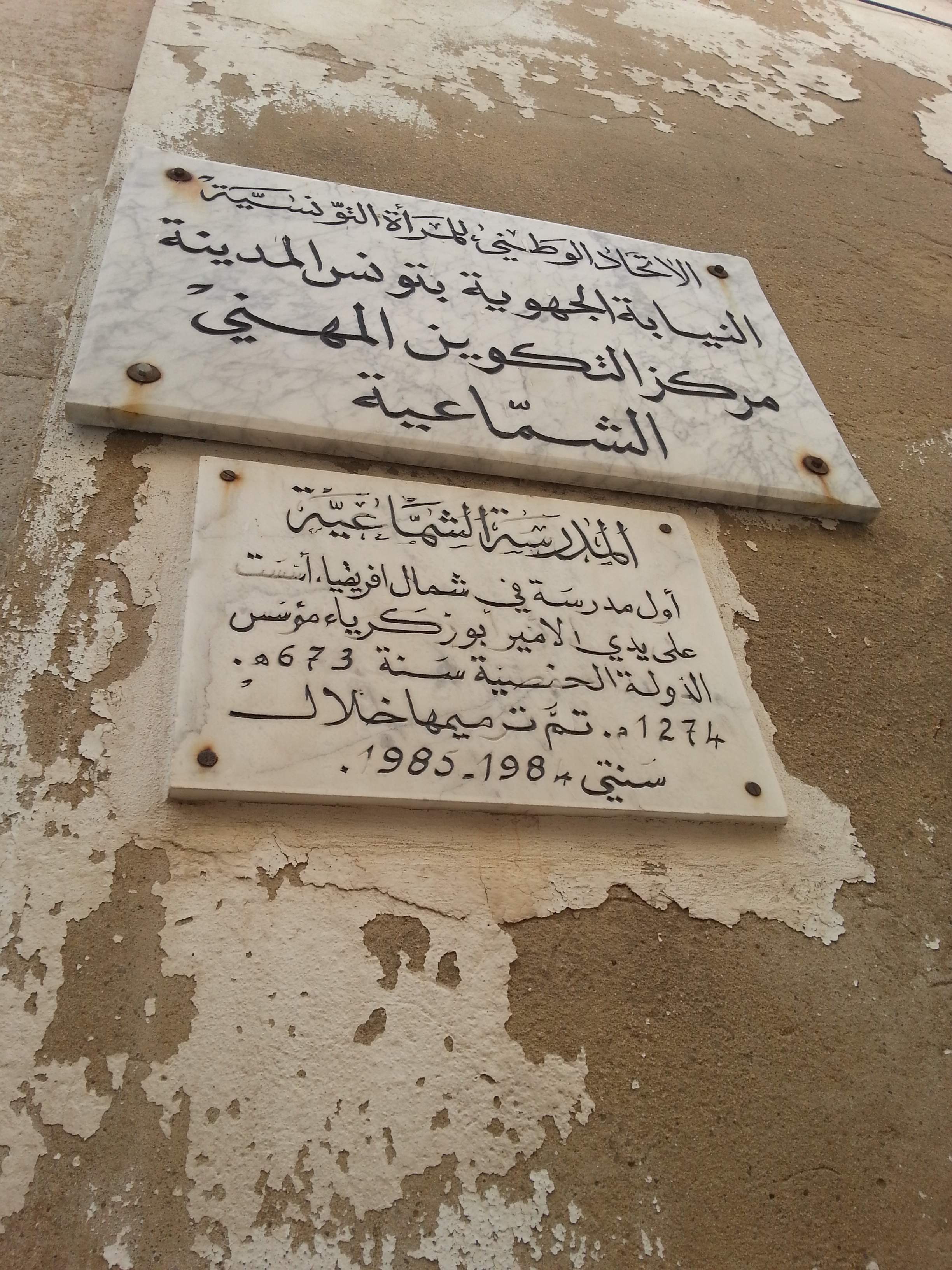 Medersa Echamaia, Tunis